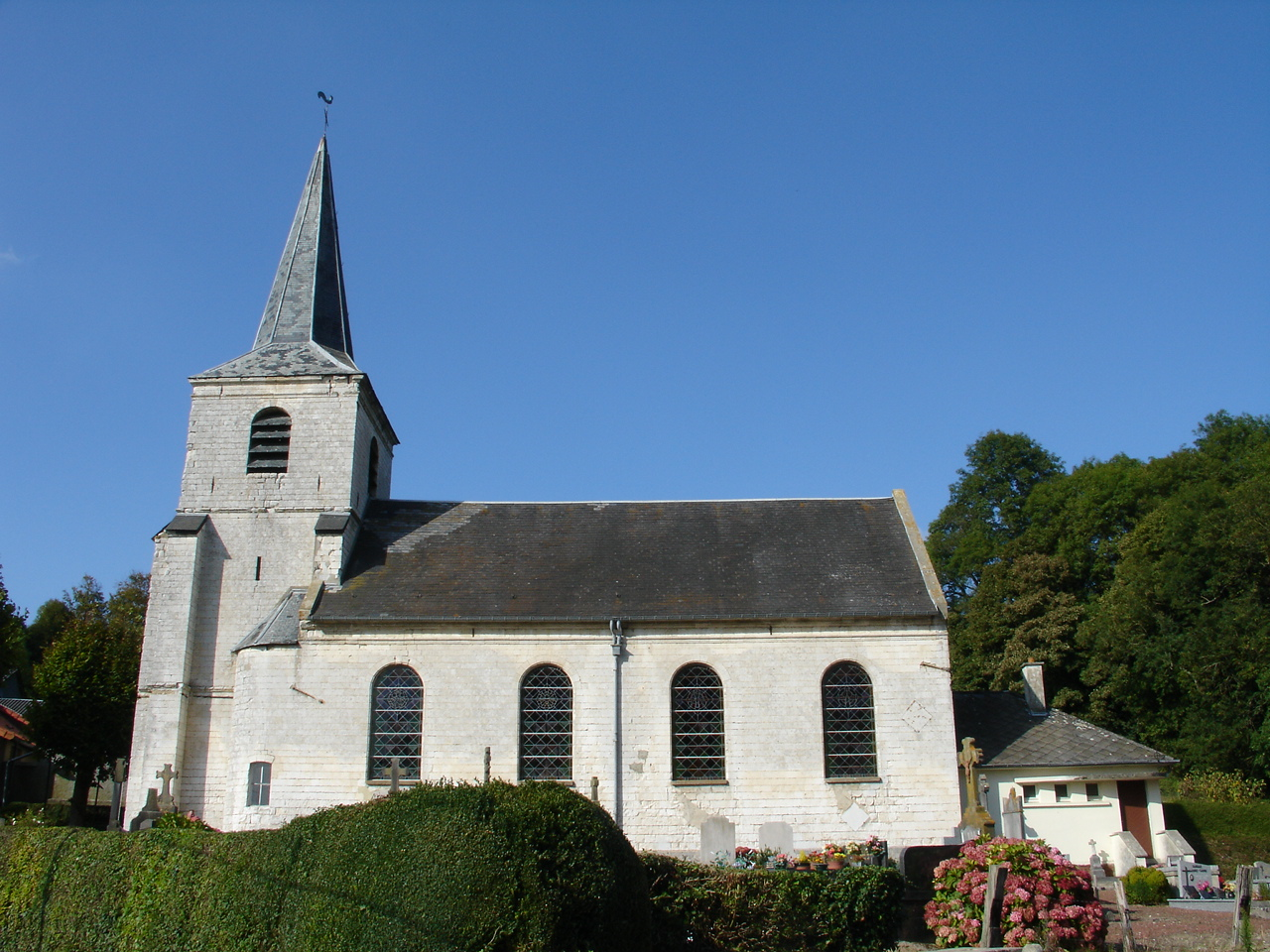 Église de Tilly-Capelle